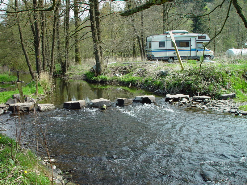 Die Wupperfurt bei Marienheide-Gogarten